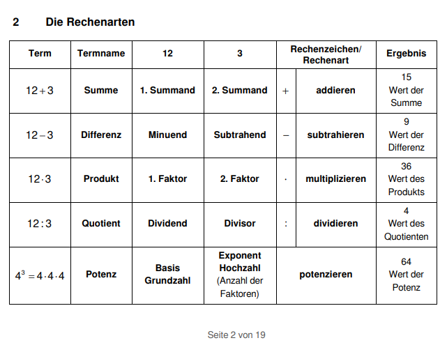 Tabelle Rechenarten